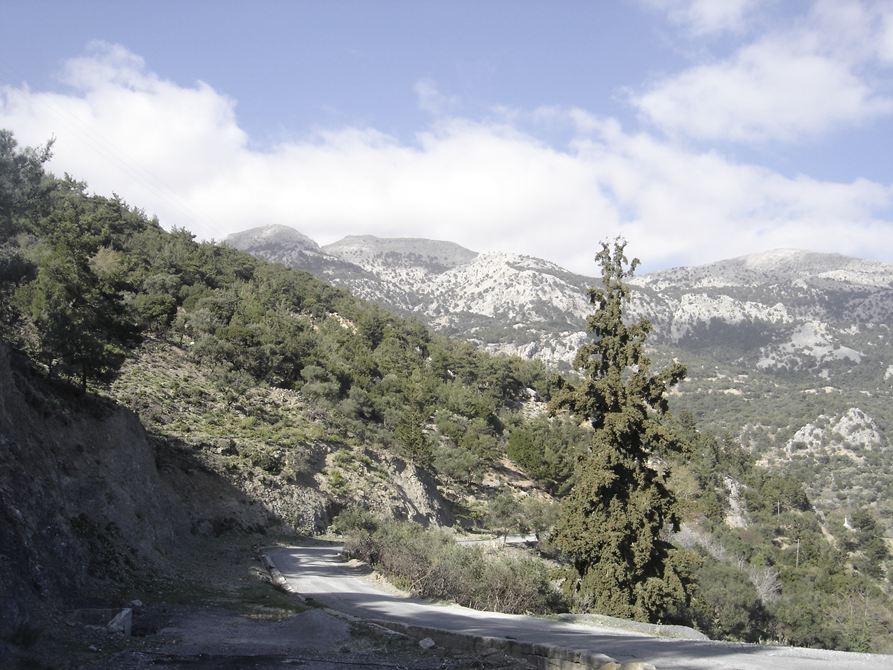 View from Kato Symi.